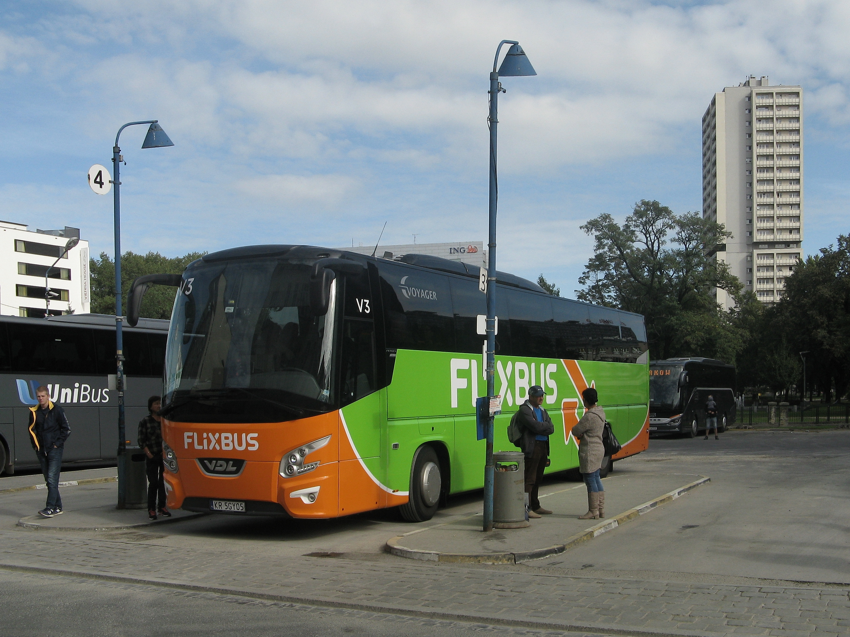 Autobus VDL Futura FHD2-129/440 (prod. 2018, V3 / Voyager Gorlice) w barwach przewoźnika Flixbusa na dworcu autobusowym w Katowicach, po prawej wieżowiec Haperowiec (Żyleta).